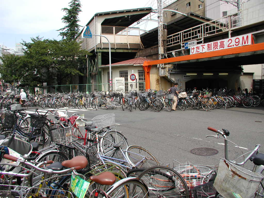 寺田町駅南口の大量に駐輪された自転車 2006年8月 Mts1008撮影